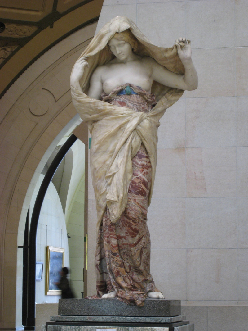 La Nature se dévoilant à la Science (Nature Unveiling Herself Before Science) (1899) by Louis-Ernest Barrias, at Musée d'Orsay